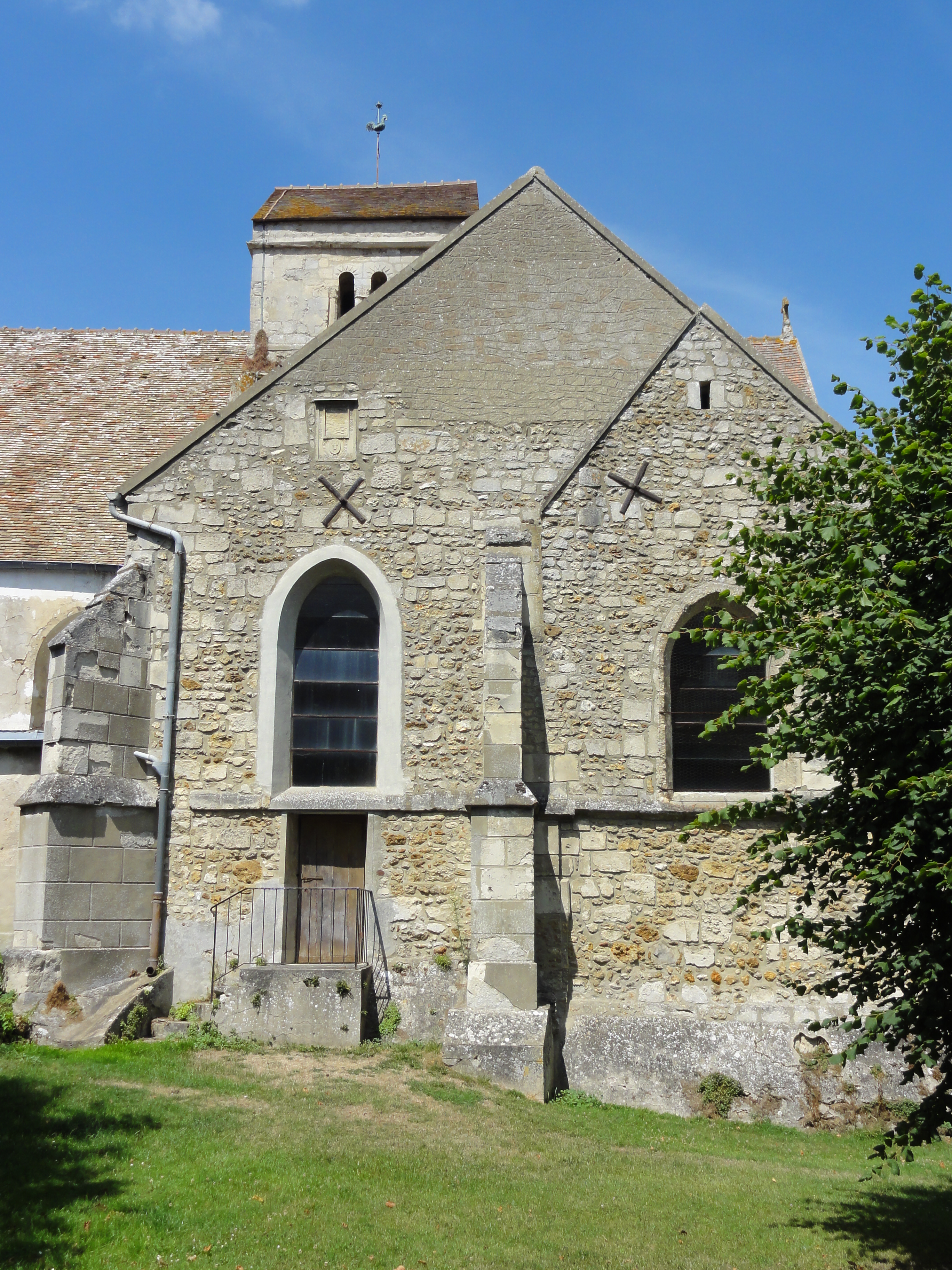 Église Saint-Aignan d'Arthies (voir titre).